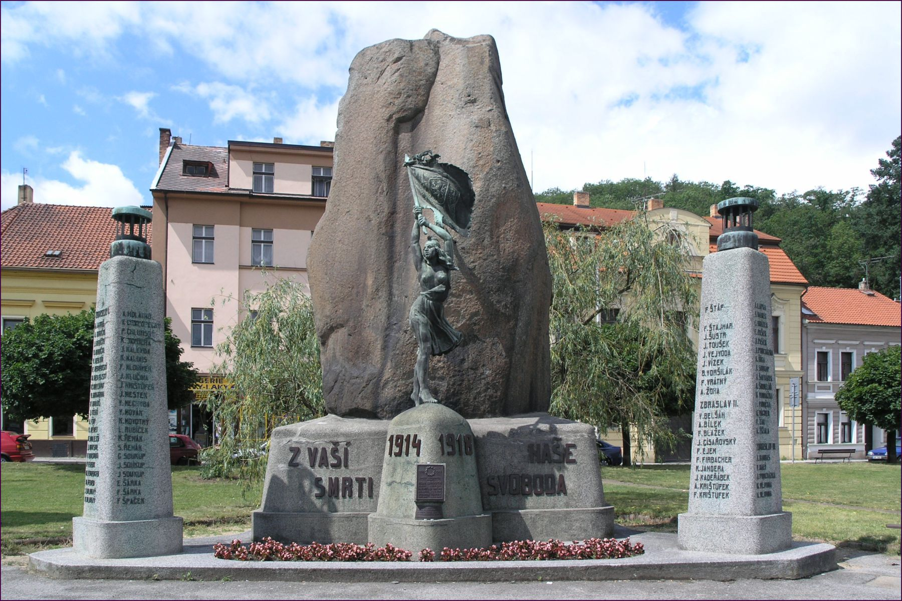 Jádro pomníku tvoří mohutný vodou ohlazený kámen, který byl vytažen z řečiště Vltavy u Kamýku, umístěný na betonovém podstavci, kde je vyhotoven nápis „Za vaši smrt naše svoboda, 1914, 1918“. Bronzová socha symbolizuje vítěznou vlast nesoucí prapor s erby československého státu. Pod letopočty byla ještě dodatečně osazena bronzová destička památce padlých hrdinů druhé světové války. Po stranách jsou umístěny pylony se jmény padlých zbraslavských občanů za první světové války. Vrcholy pylonů jsou osazeny dvěma bronzovými lampami. Pomník je kulturní památkou zapsáno do státního seznamu kulturních památek před rokem 1988.